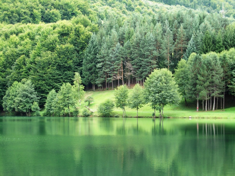 Veliko jezero Balkana, nedaleko od Mrkonjić Grada